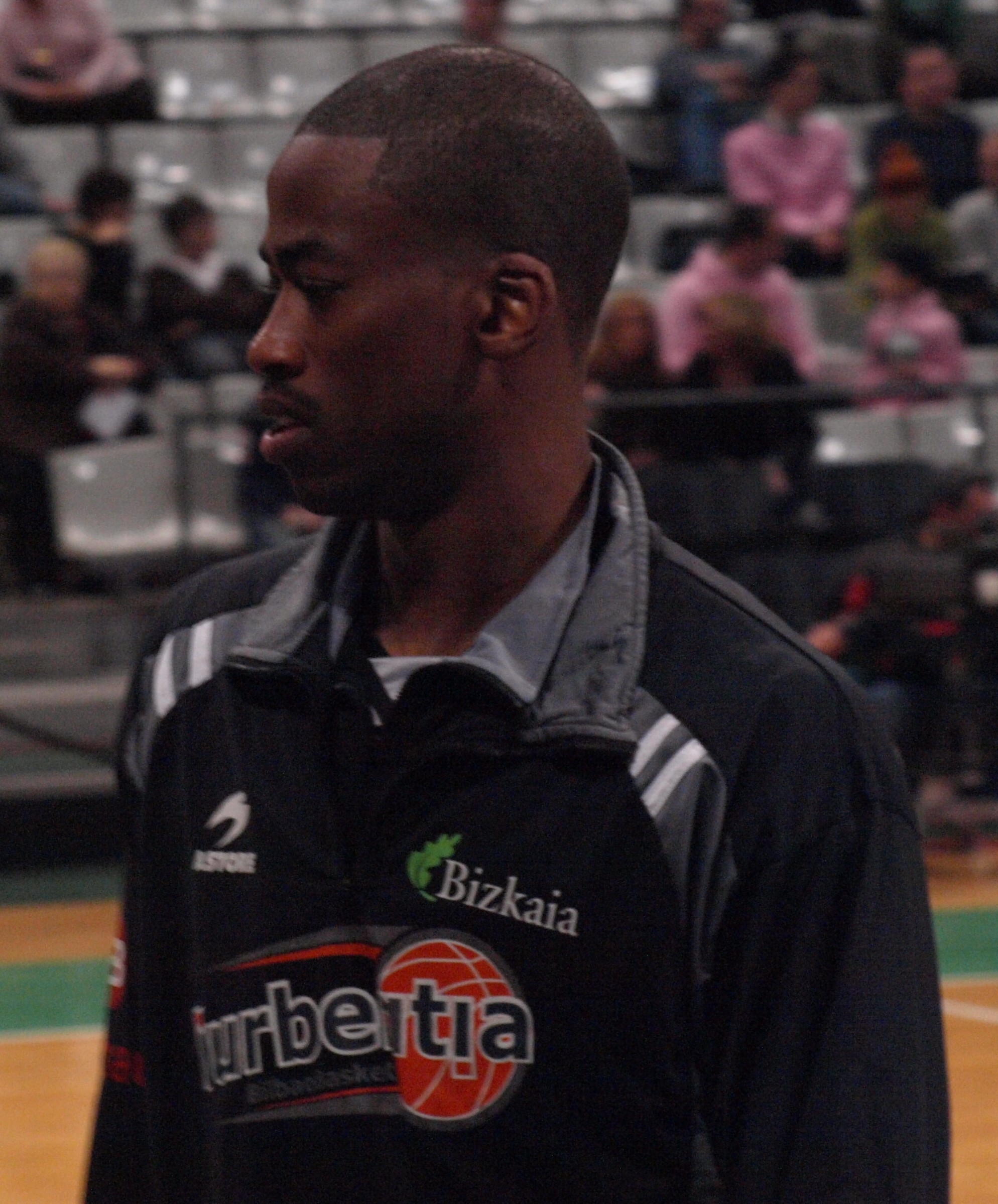 Quincy Lewis en el encuentro que enfrentó al Iurbetia Bilbao con el DKV Joventut de la liga ACB 2008/09 en el olímpico de Badalona